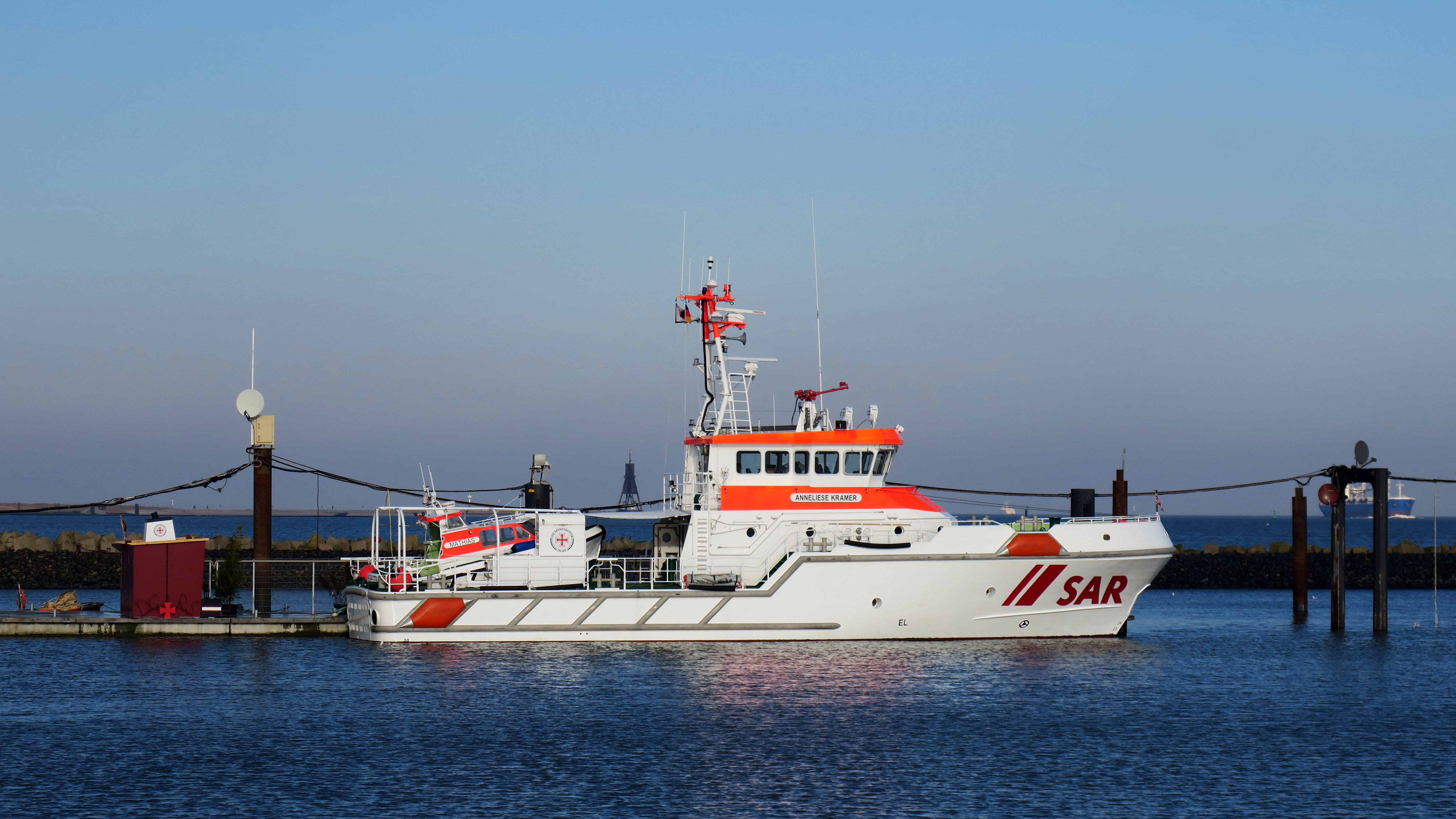 SK "Anneliese Kramer" am Liegeplatz in Cuxhaven